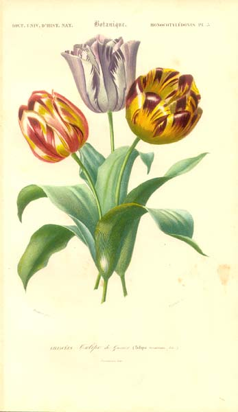 Painting of Tulipa gesneriana